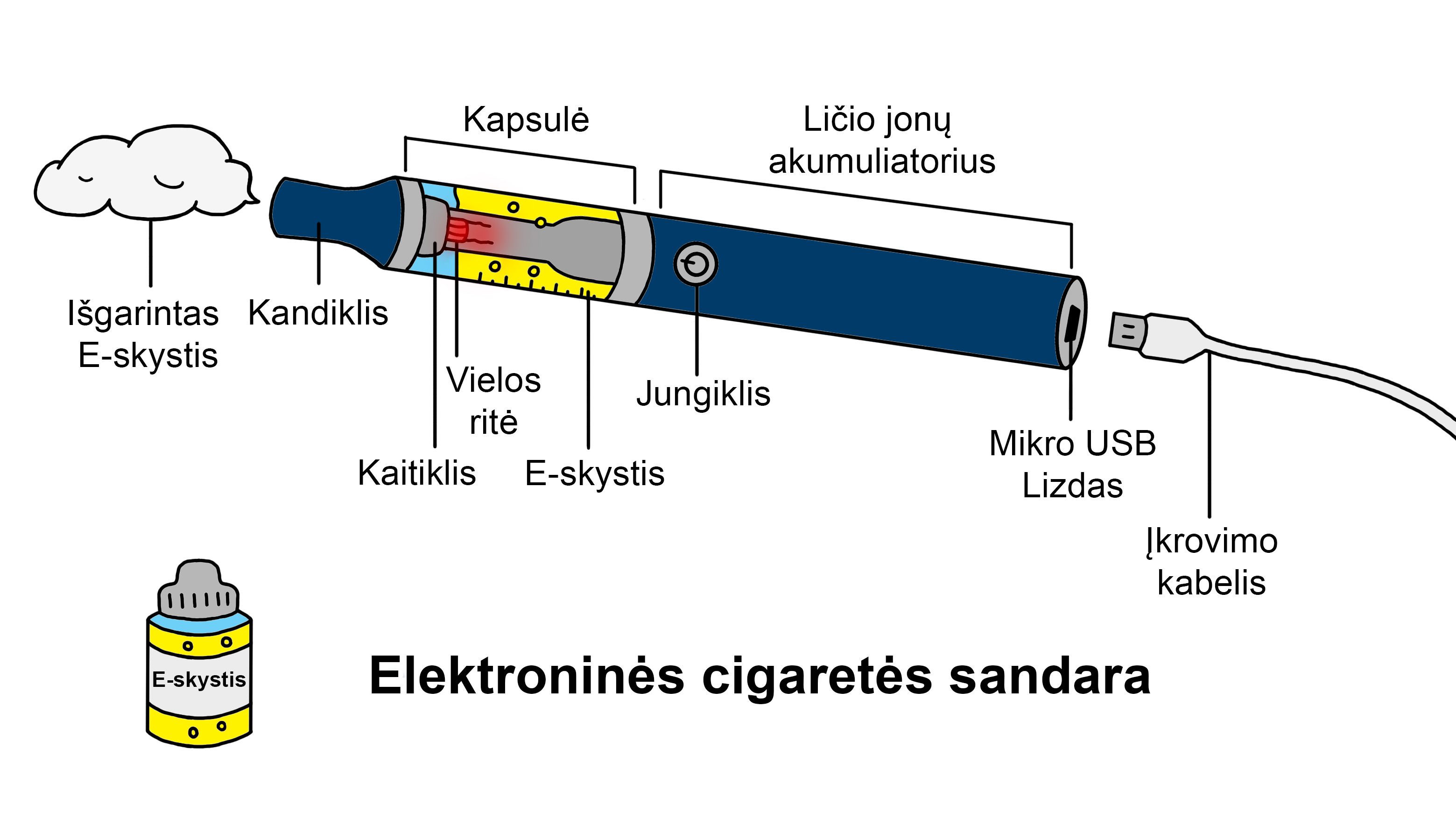 Elektroninės cigaretės sandara